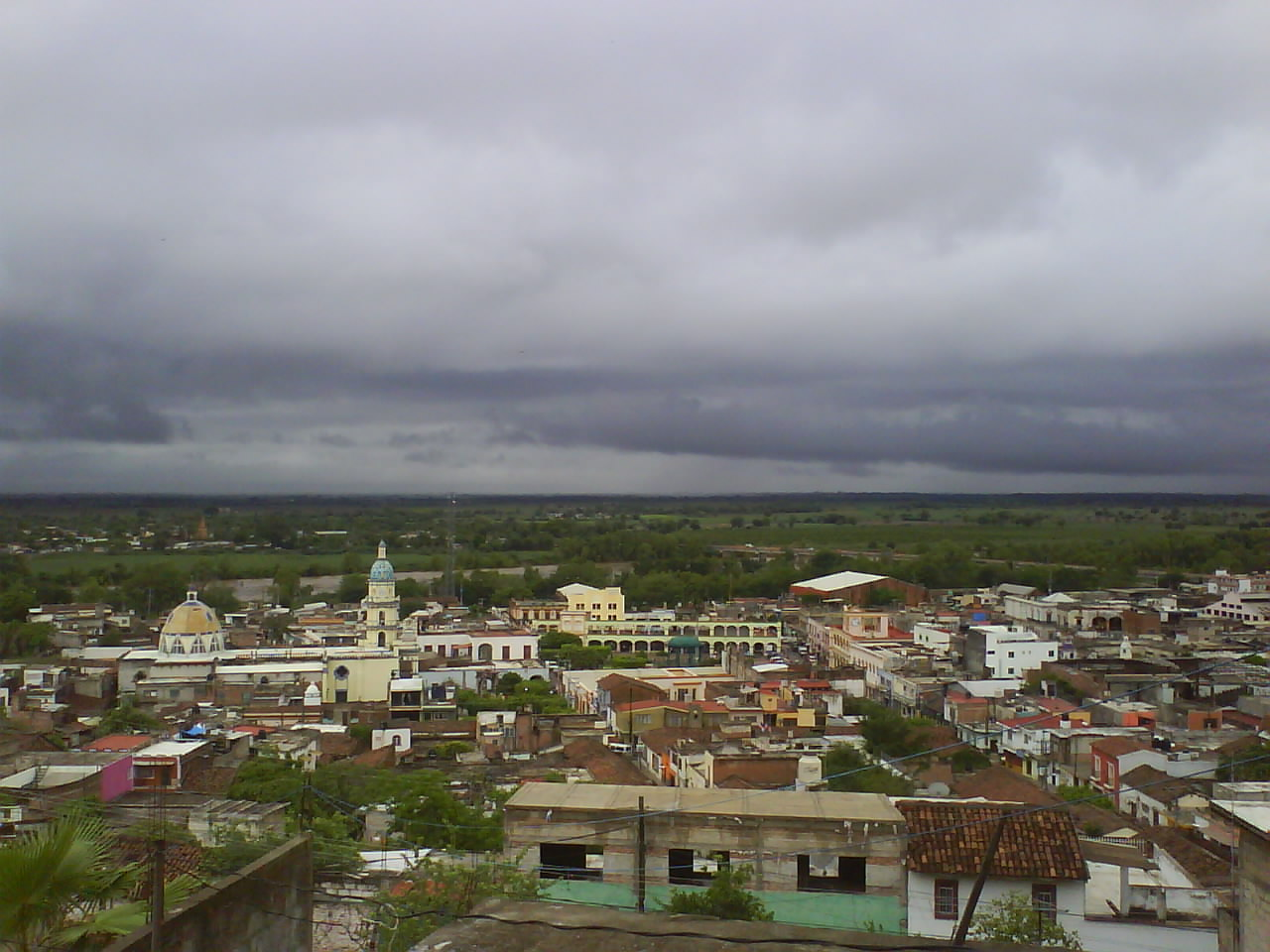 Town central